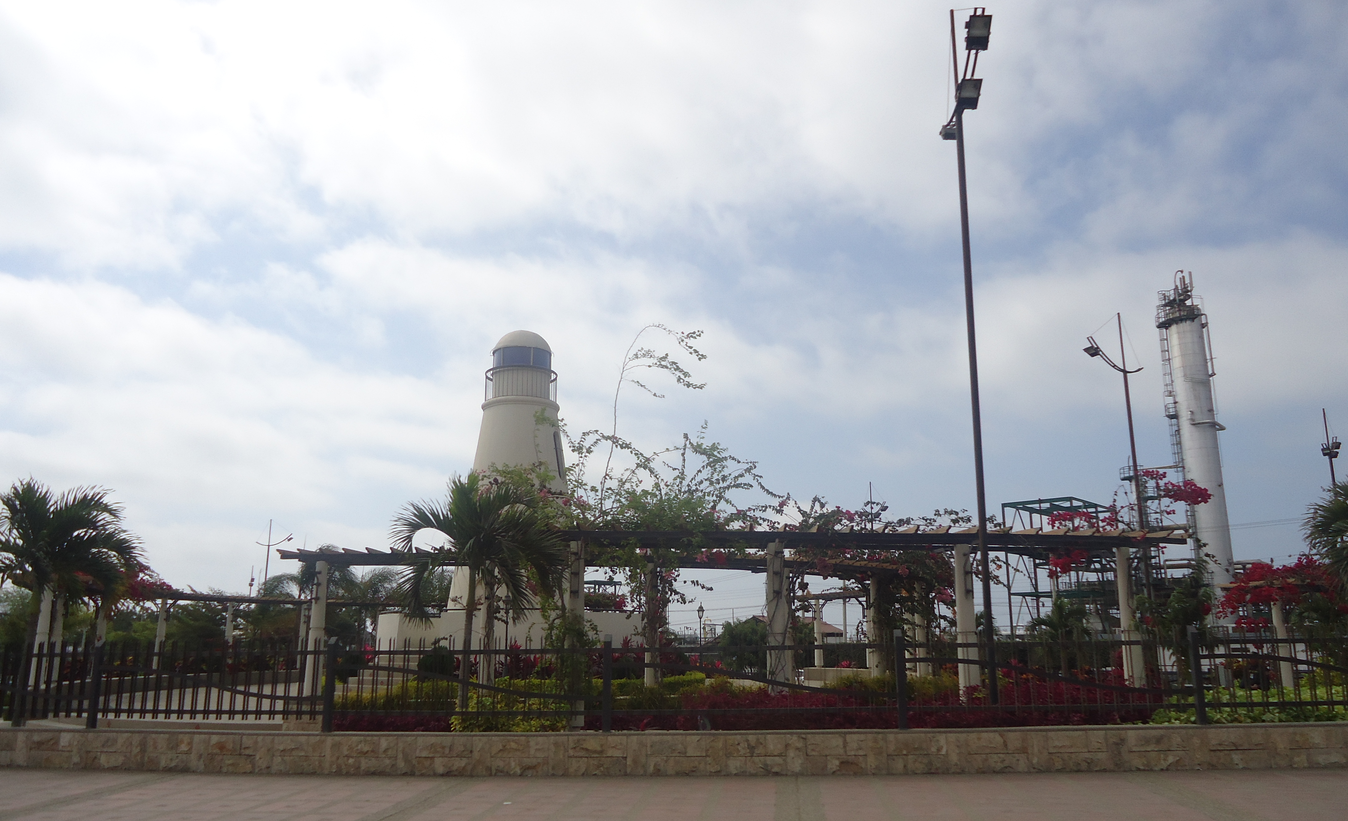 Plaza La Libertad y Refineria La Libertad